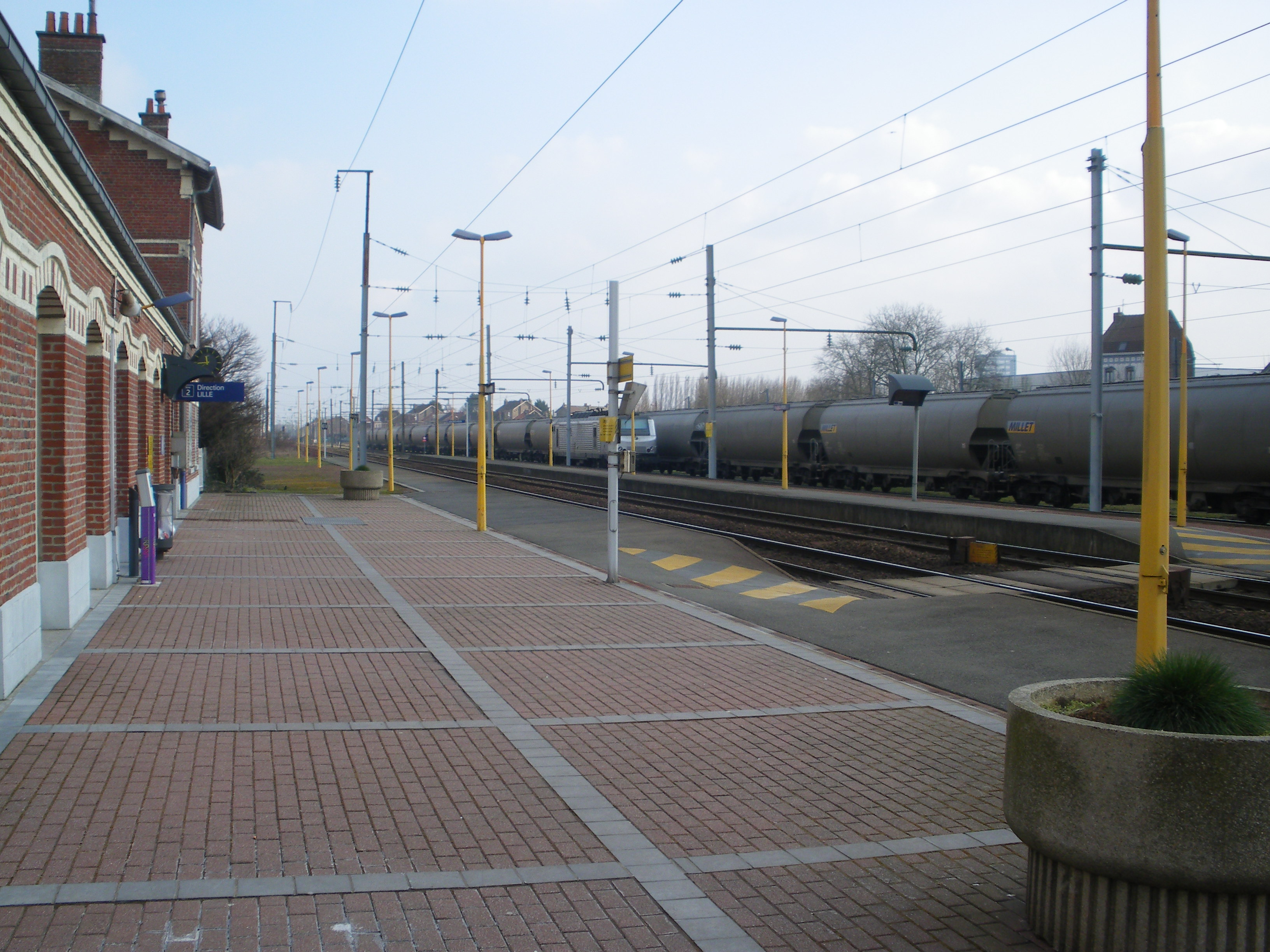 Vue de la ligne de Fives à Abbeville depuis le quai de la gare d'Haubourdin.